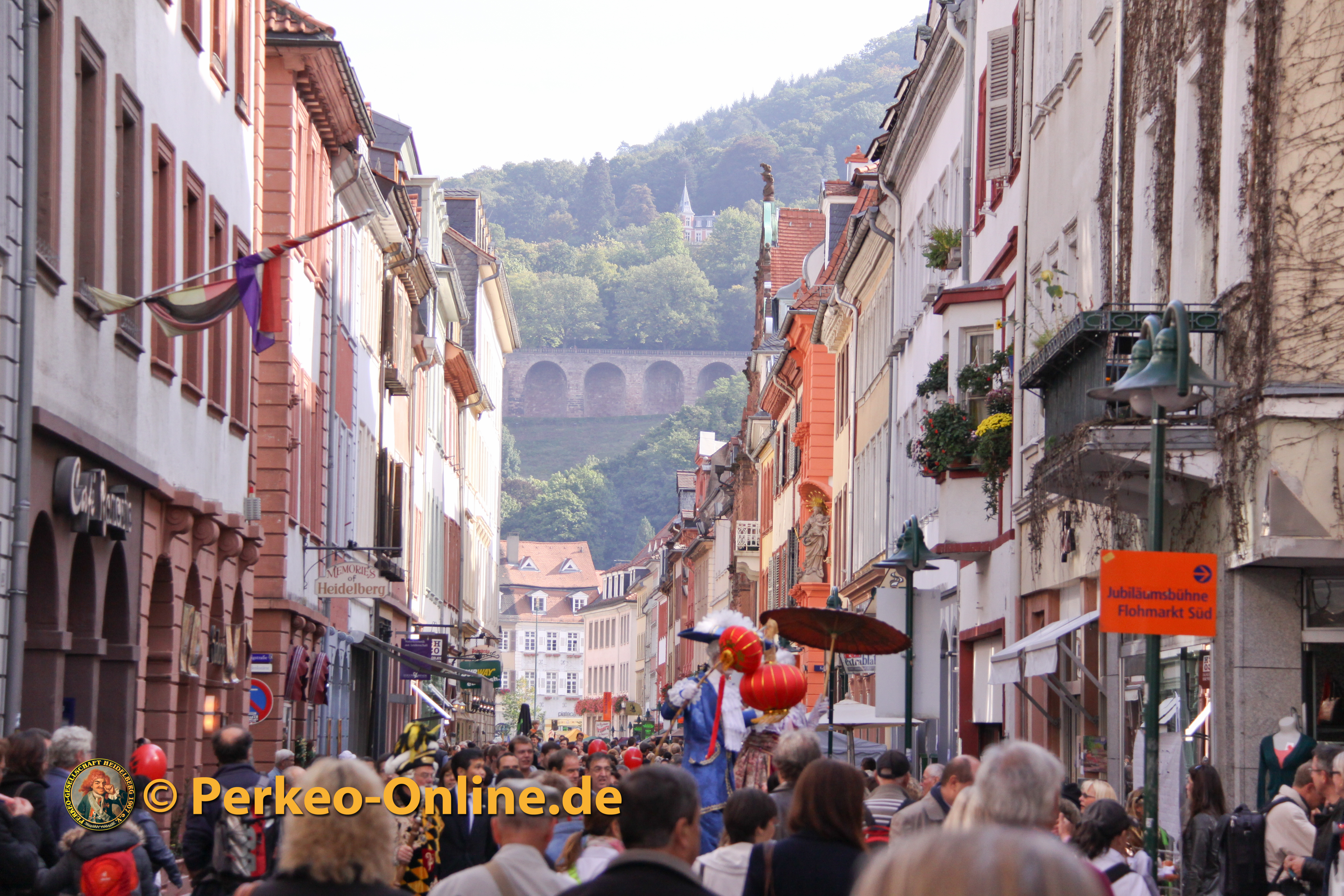 43. Heidelberger Herbst